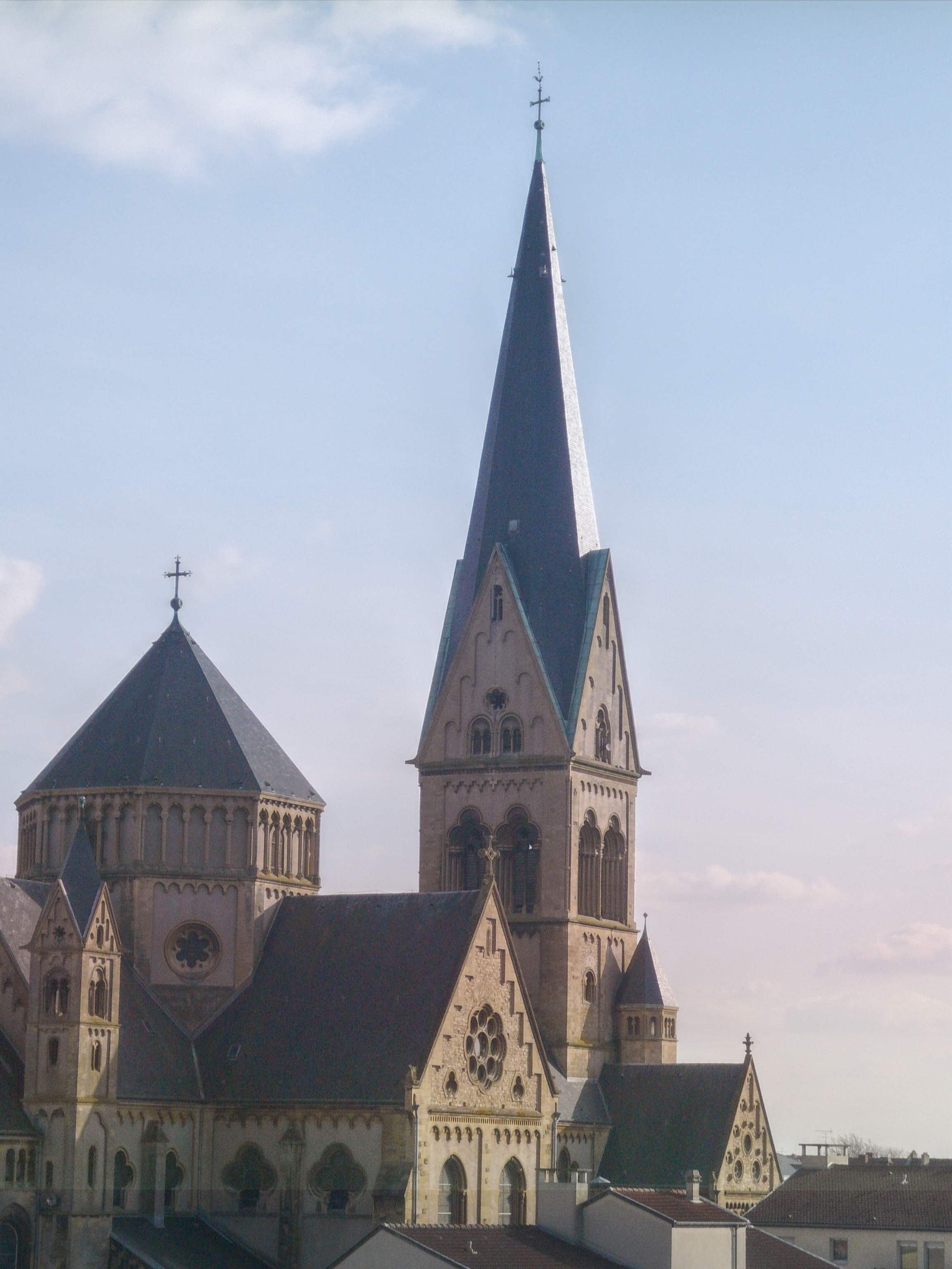 Montigny-Lès-Metz (Moselle - France), Église Saint-Joseph